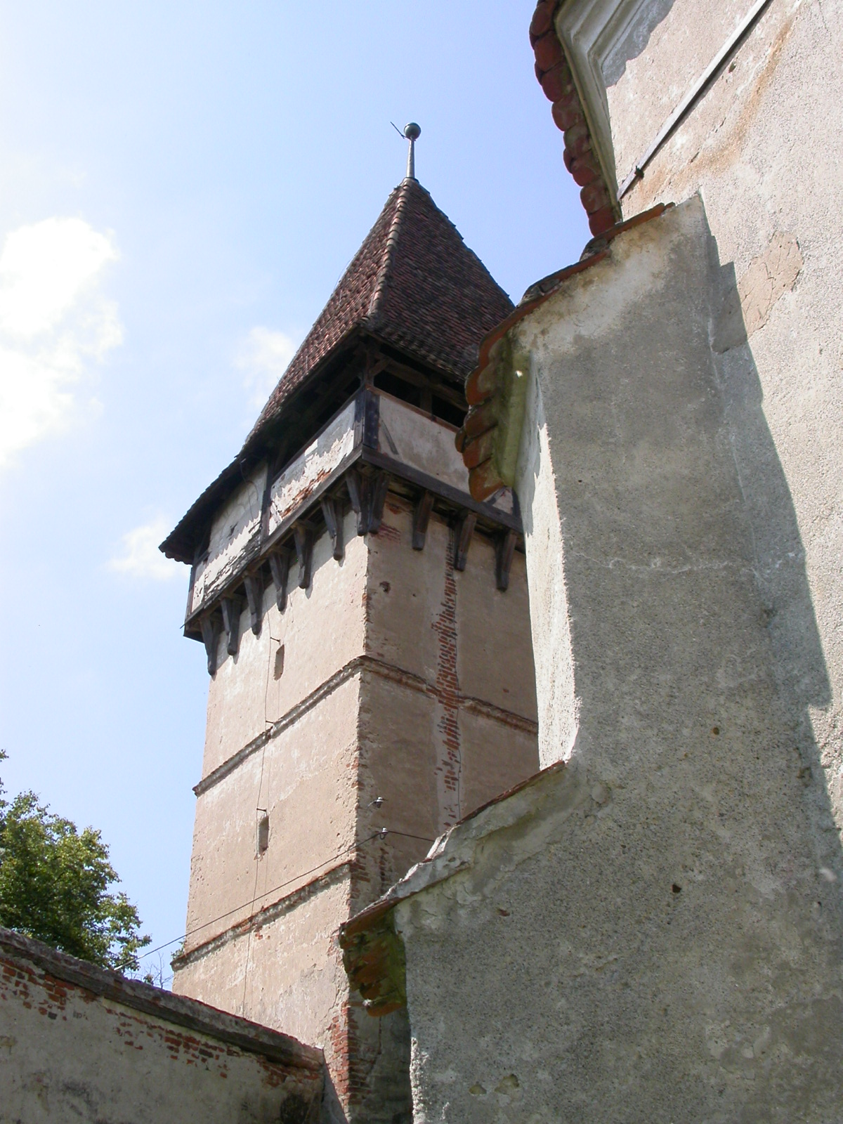 Ansamblul bisericii evanghelice fortificate, sec. XV - XVIII